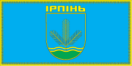 Прапор Ірпеня